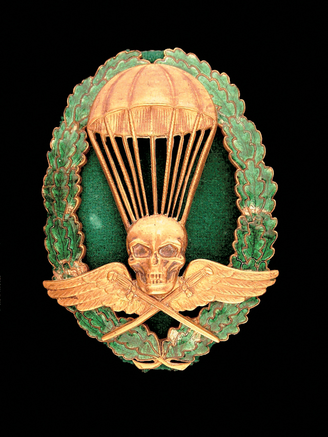 Magyar Királyi Honvédség Ejtőernyős Ügyességi Jelvény